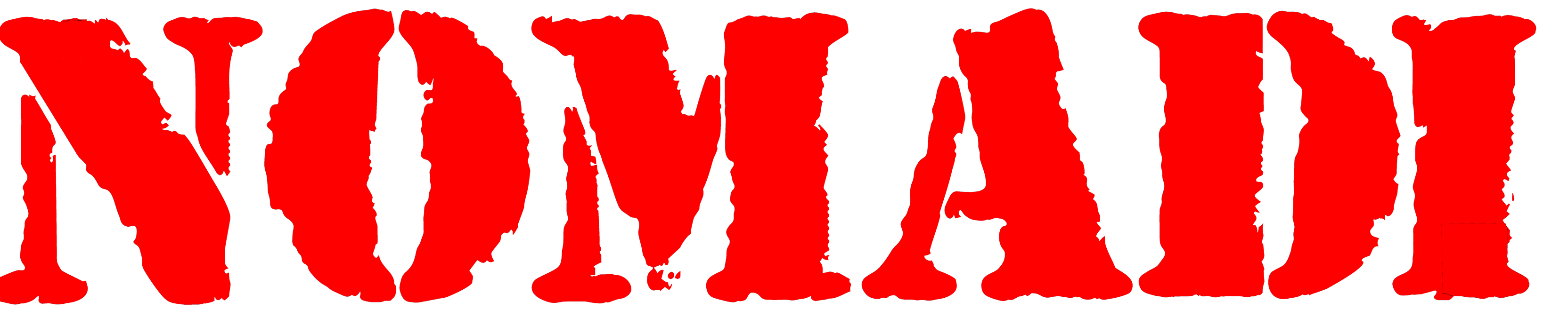 Logo Ufficiale NOMADI